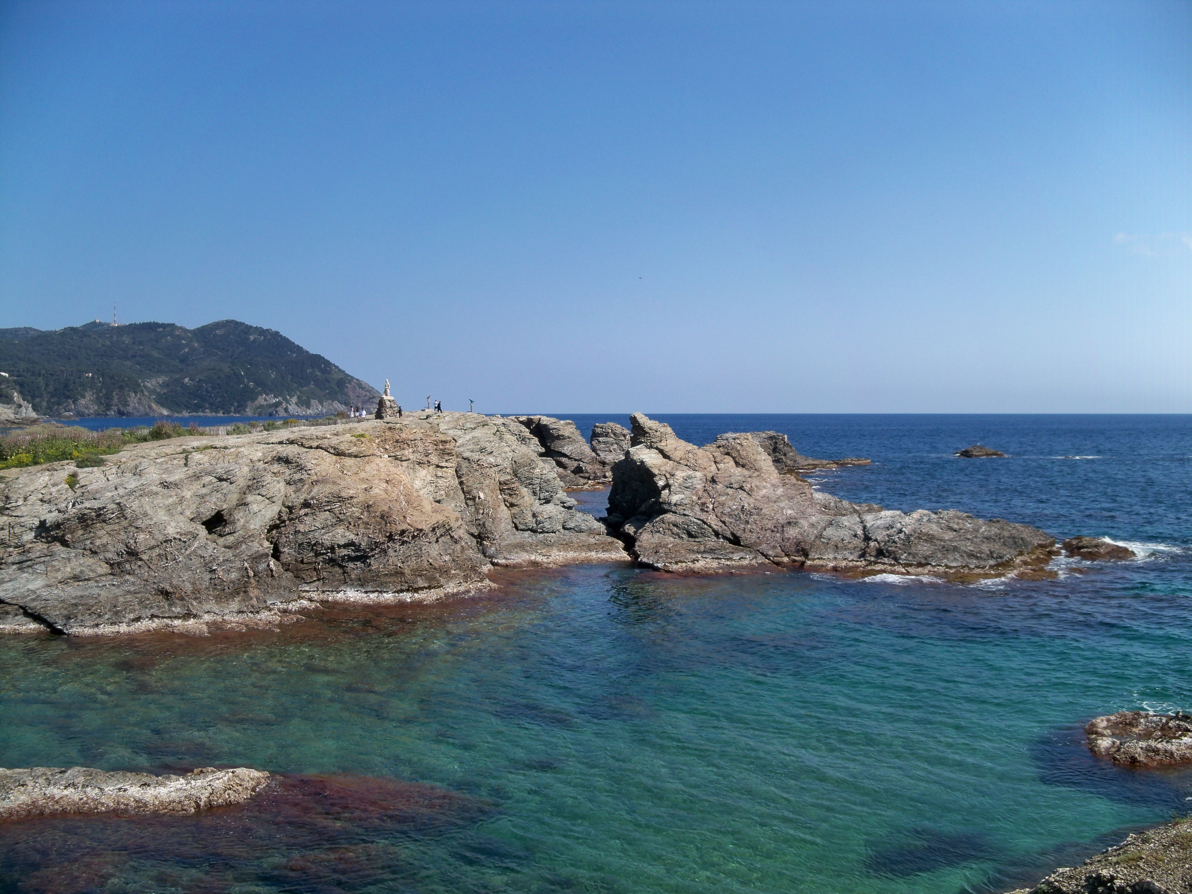 Dans l'archipel des Embiez, commune de Six Fours